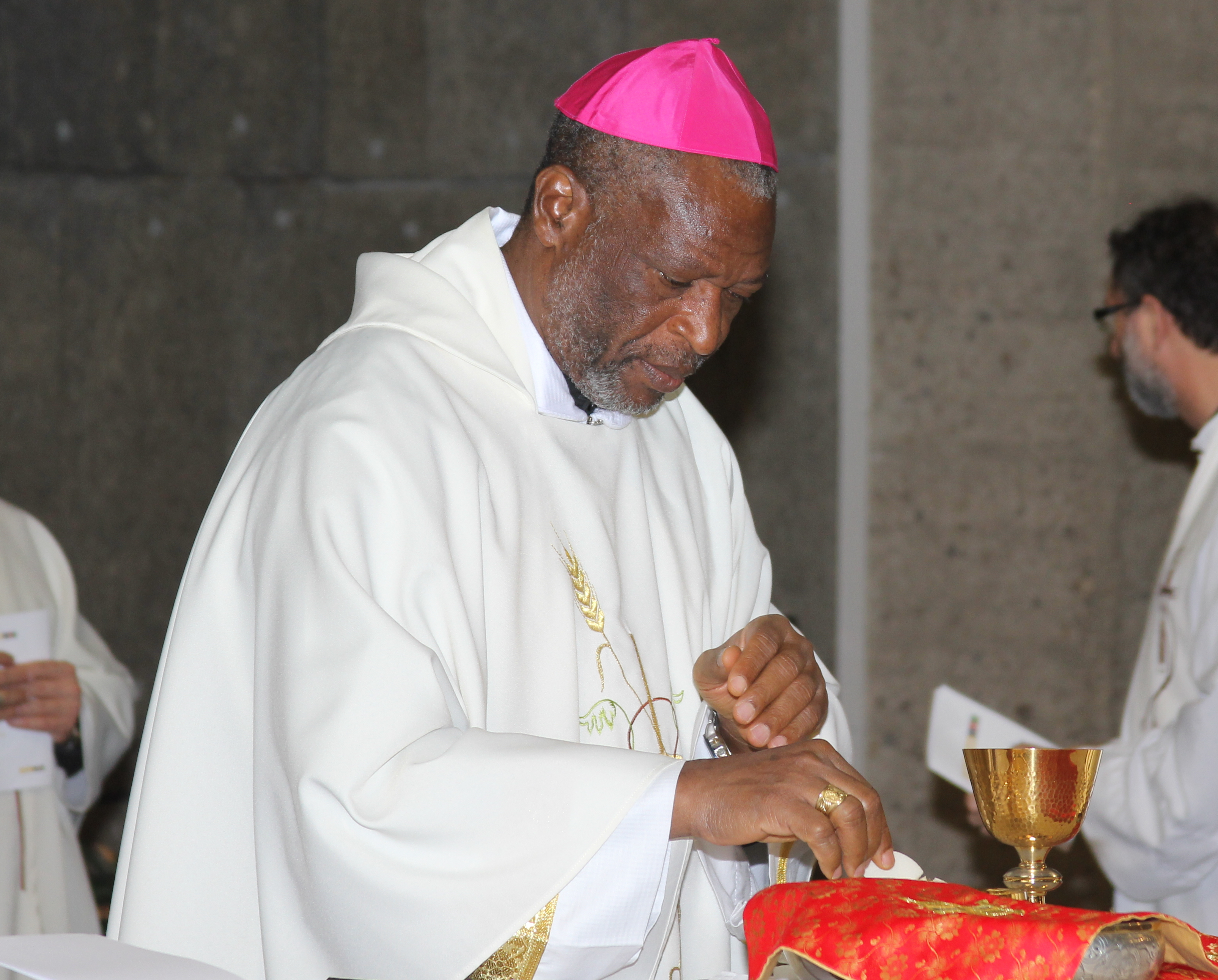 Mgr Joseph Danlami Bagobiri, lors d'une messe célébrée par le patriarche Ignatius Joseph III Younan.